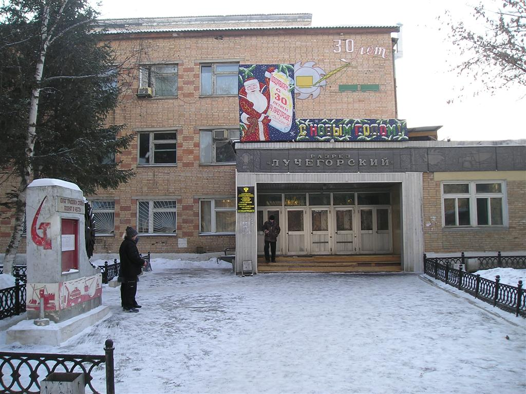 Лучегорское управление разрезом